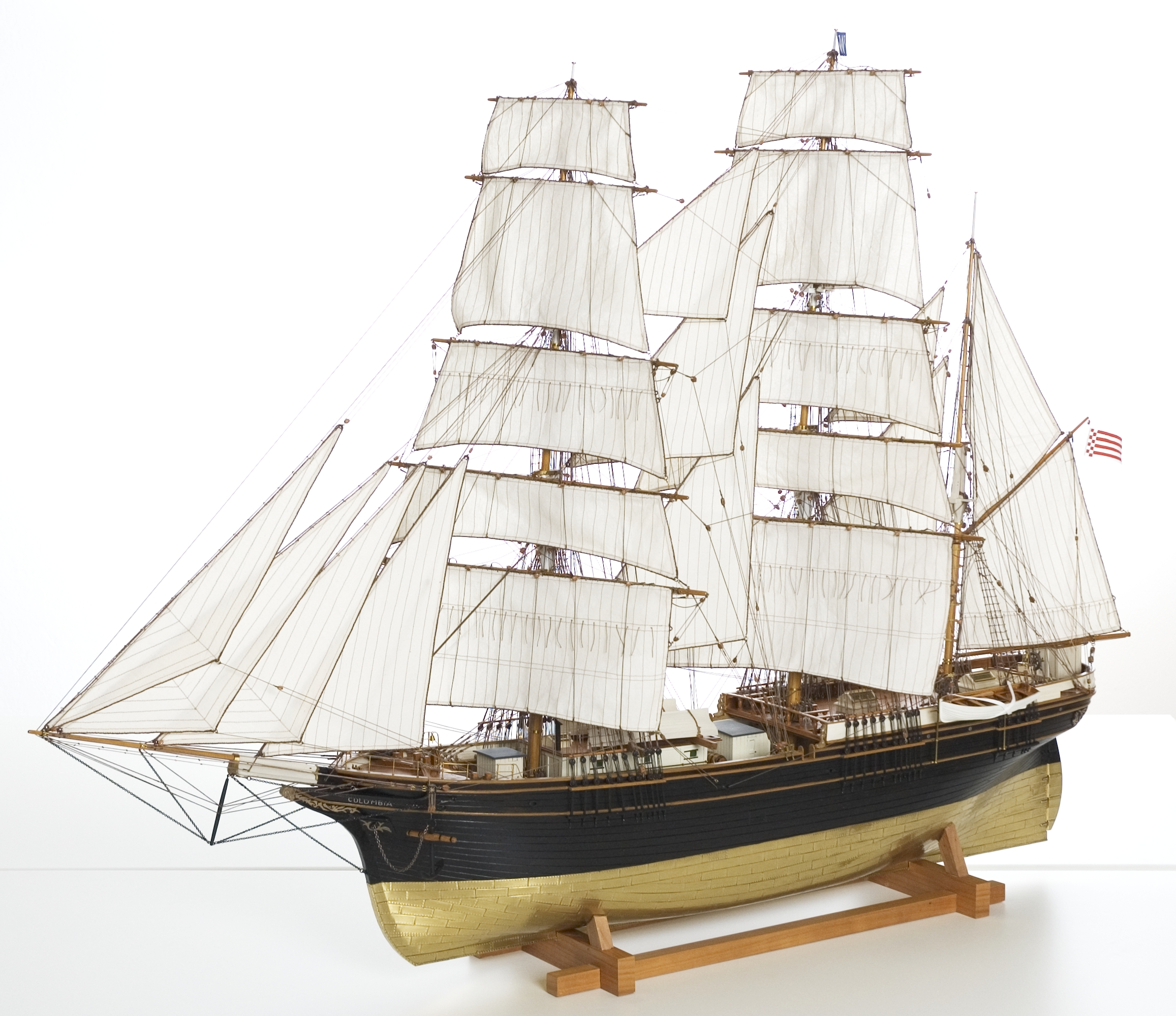 Schiffsmodell der Dreimastbark Columbia der Reederei D. H. Wätjen & Co,, Maßstab 1:50, Tecklenborg-Werft, Geestemünde, Baujahr 1862.